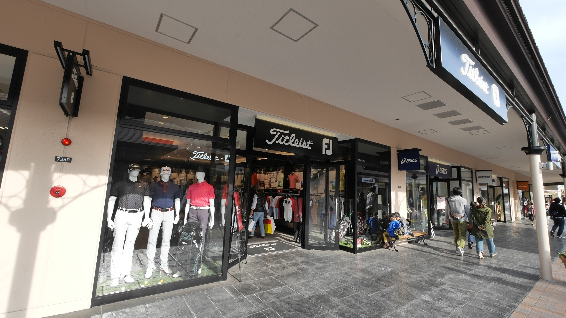 三井アウトレットパーク 木更津 Titleist